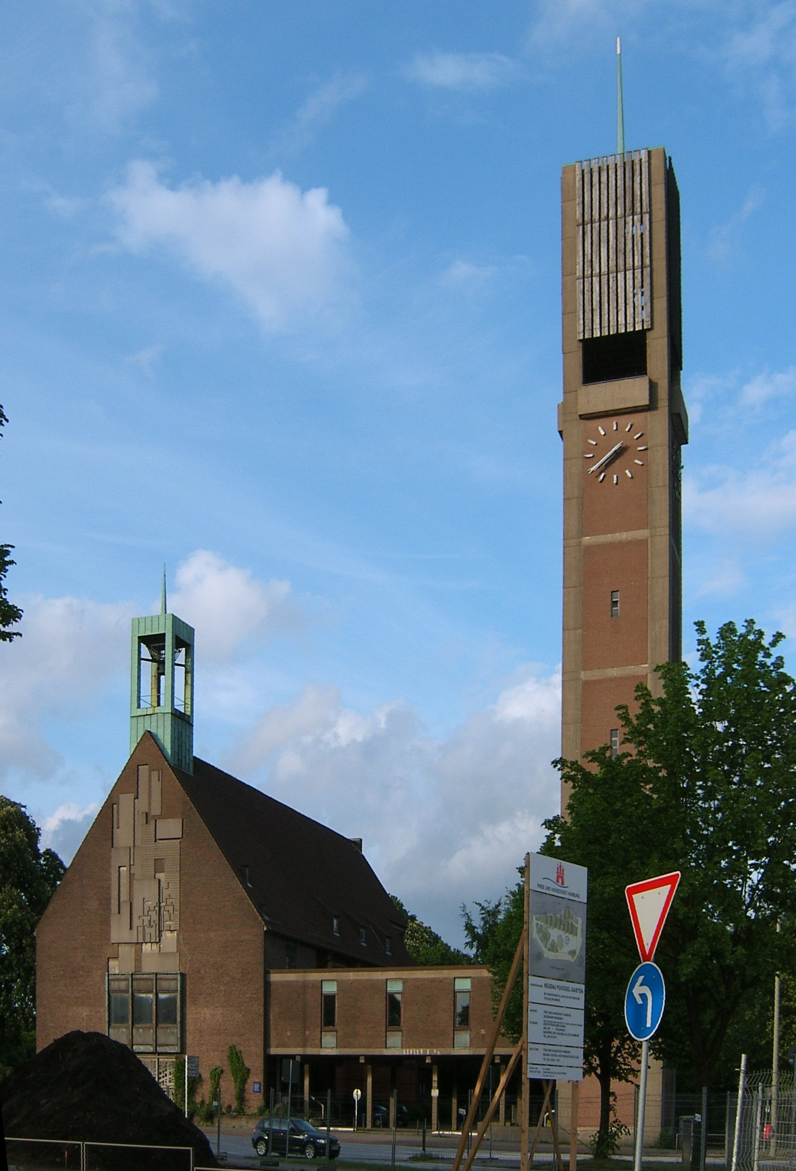 Die heutige Bau der Christuskirche in Wandsbek wurde 1953/54 von Hopp & Jäger errichtet.This is a photograph of an architectural monument.